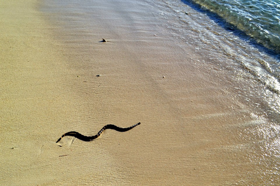 Photo d'un tricot rayé que j'ai prise lors d'un camping à l'îlot Signal